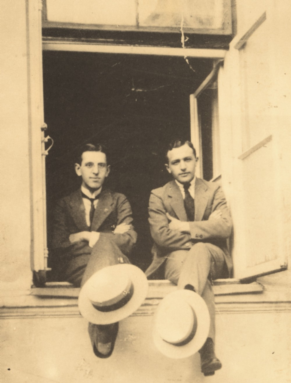 Bjalistokaj esperantistoj - Jakobo Ŝapiro kaj Abrahamo Zbar - sur fenestro ĉe la strato Lipowa 31 en Bjalistoko